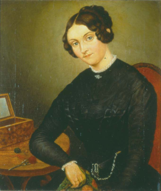 Gemälde der Schriftstellerin und Komponistin Johanna Kinkel.